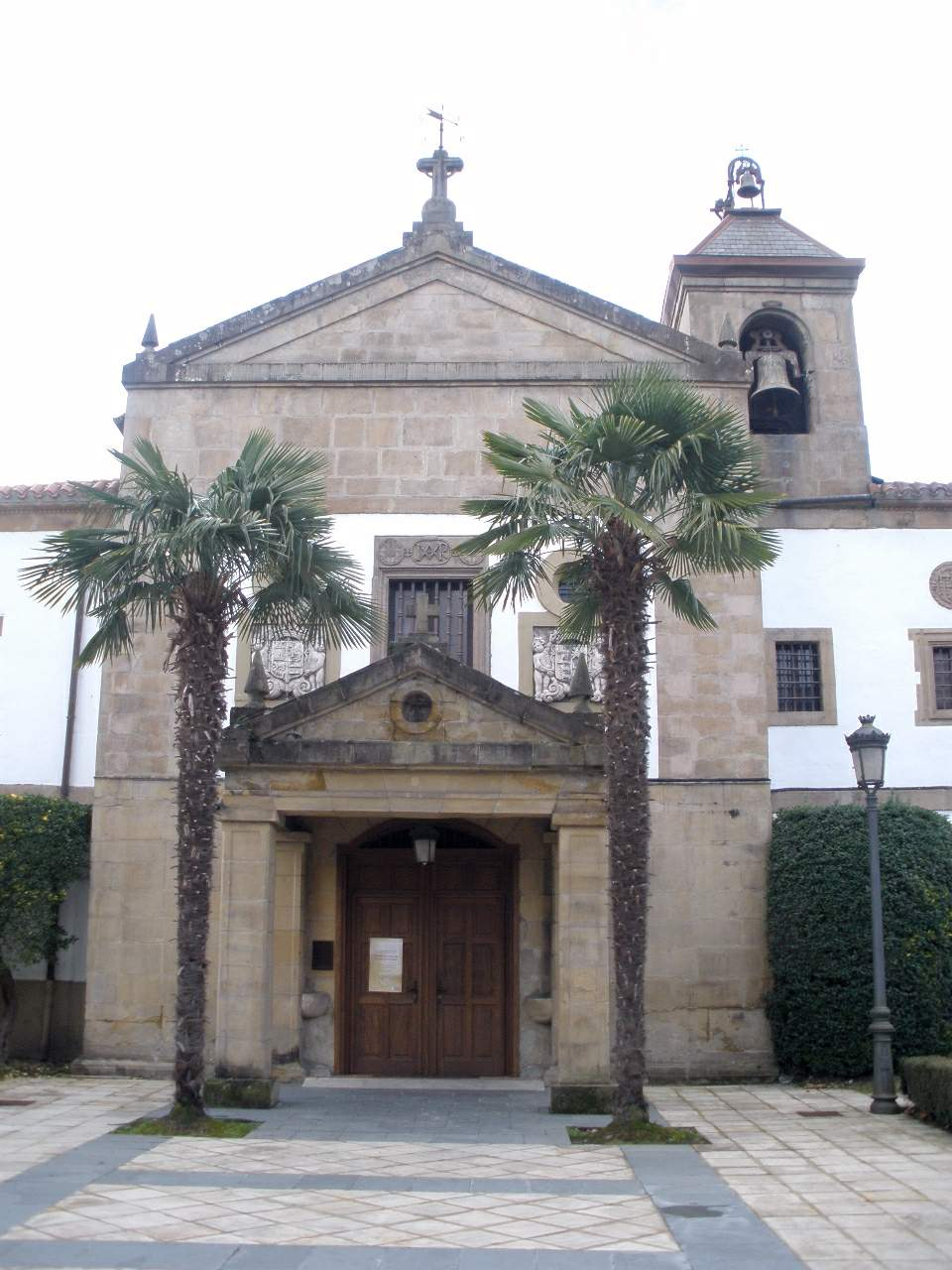 Convento de las Brígidas (Lasarte-Oria, Gipúzkoa)